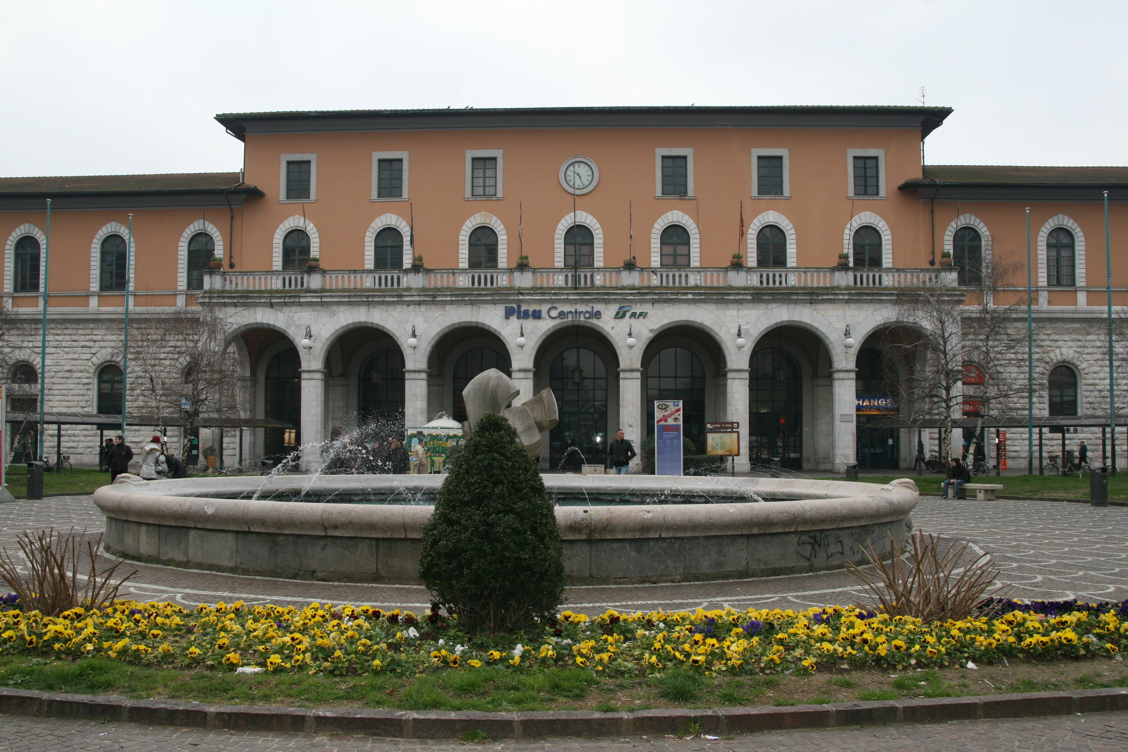 比萨火车站